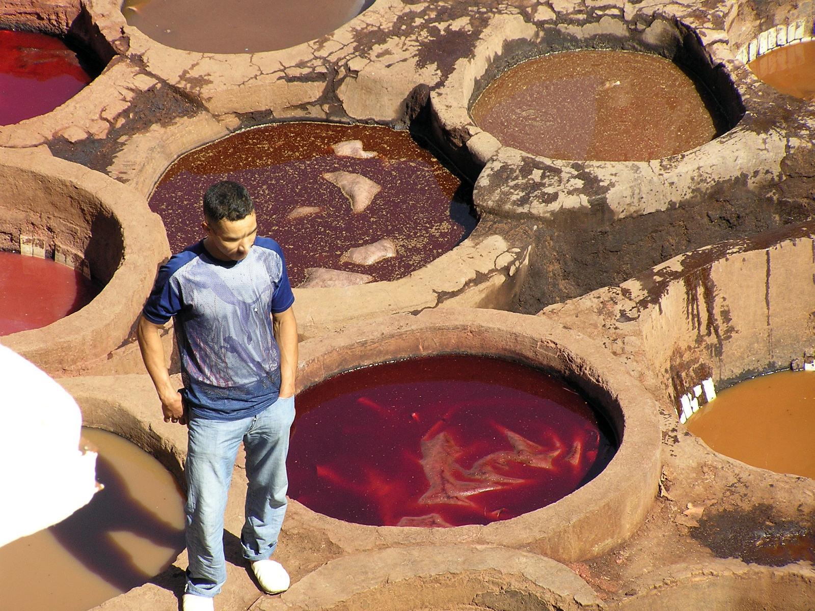 Nahblick auf Materialien in Gerberei/Färberei in Fes, Marokko